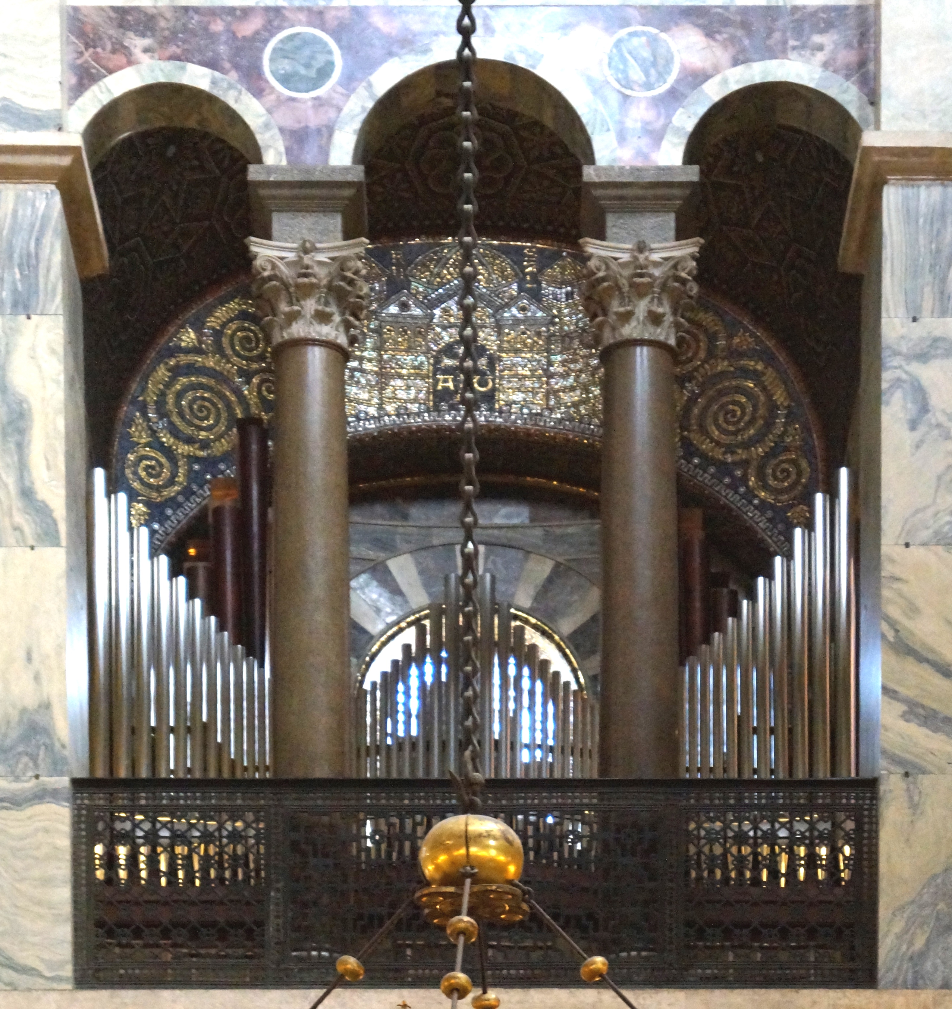 Aachener Dom Orgel im oberen Umgang